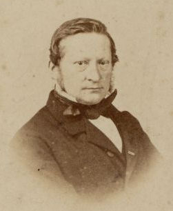 Albartus Gerhardus Wijers (1816-1877), burgemeester van Amersfoort